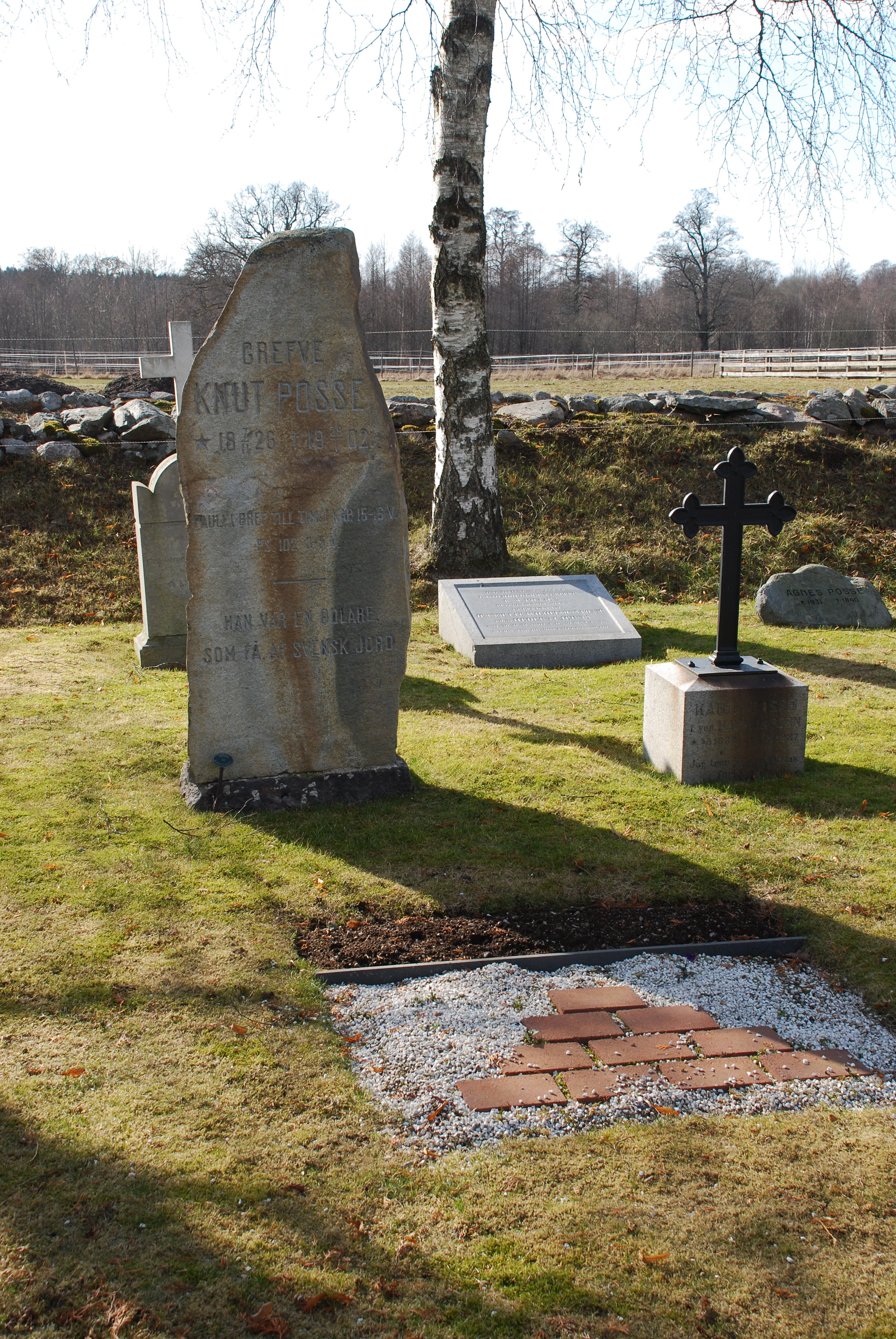 Gravlunden för familjen Posse; den stora stenen tillhör Knut Posse